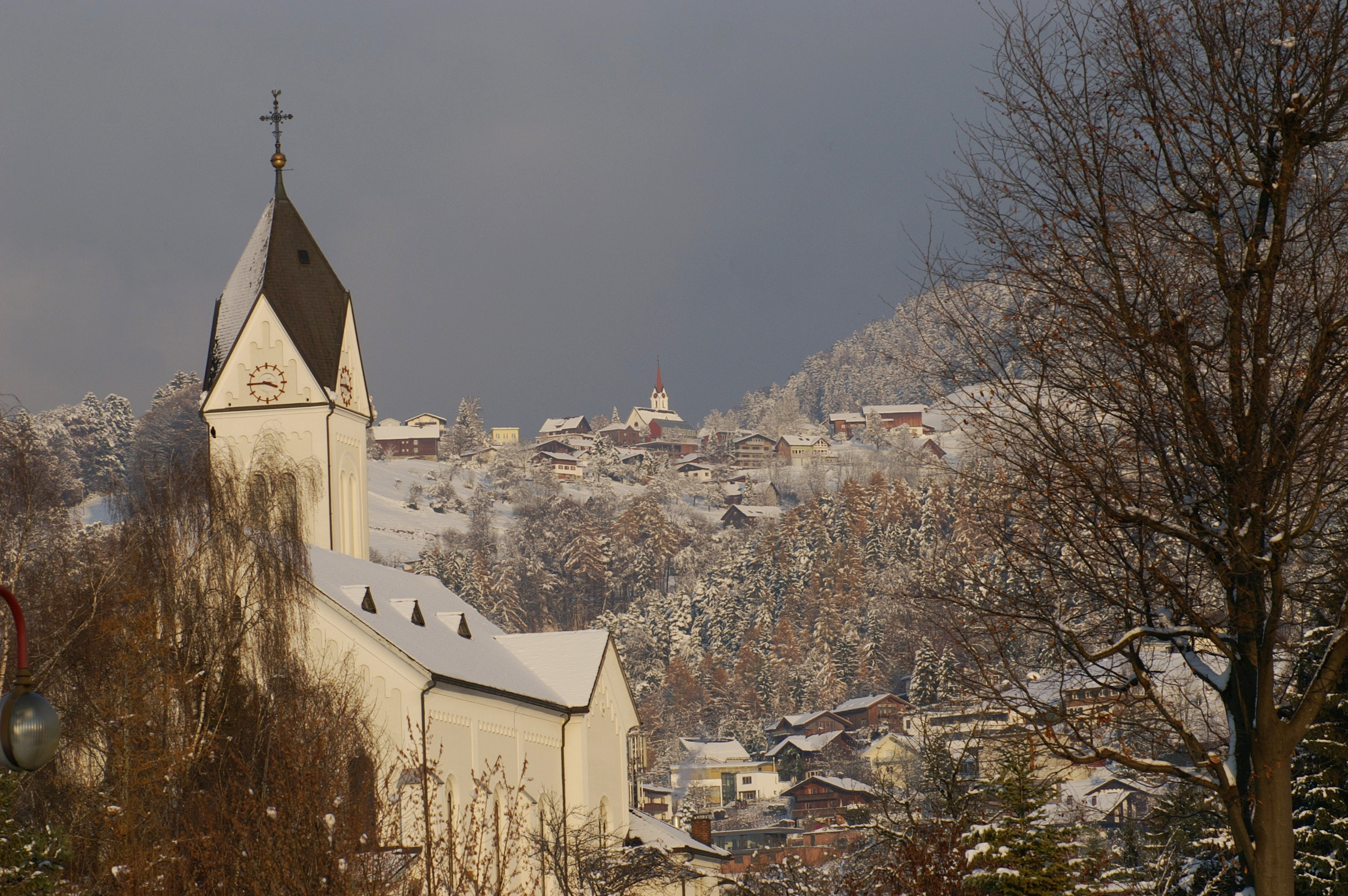 Pfarrkirche St.Georg in Sulz, Vorarlberg; im Hintergrund der Ort Dafins